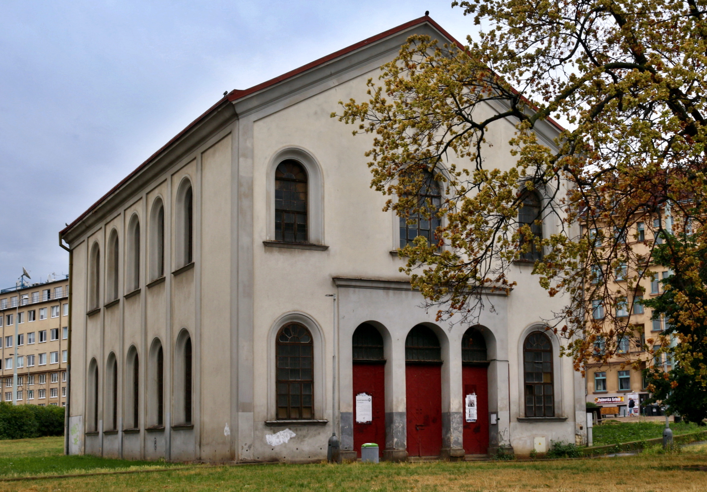 Palmovka, Nová libeňská synagoga